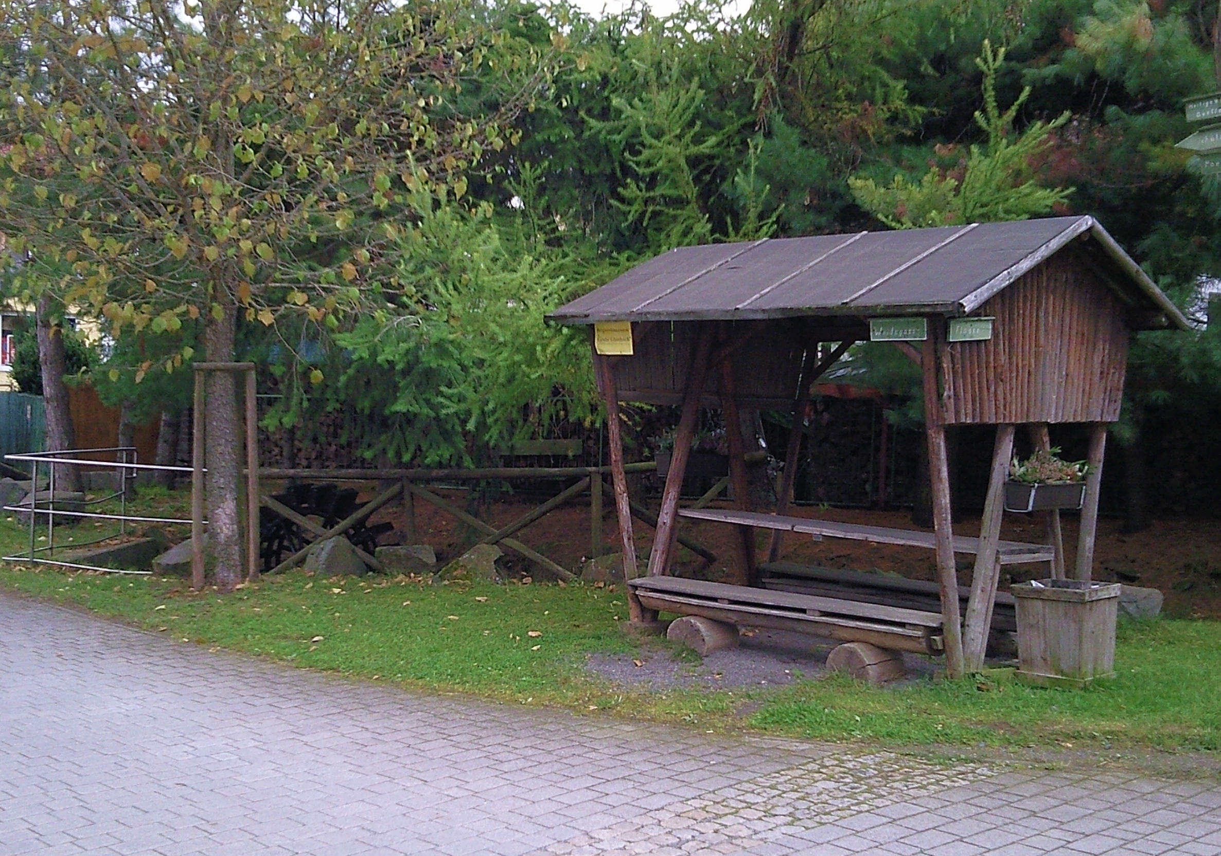 Rastplatz an einem Wasserrad an der Straßberger Flösse